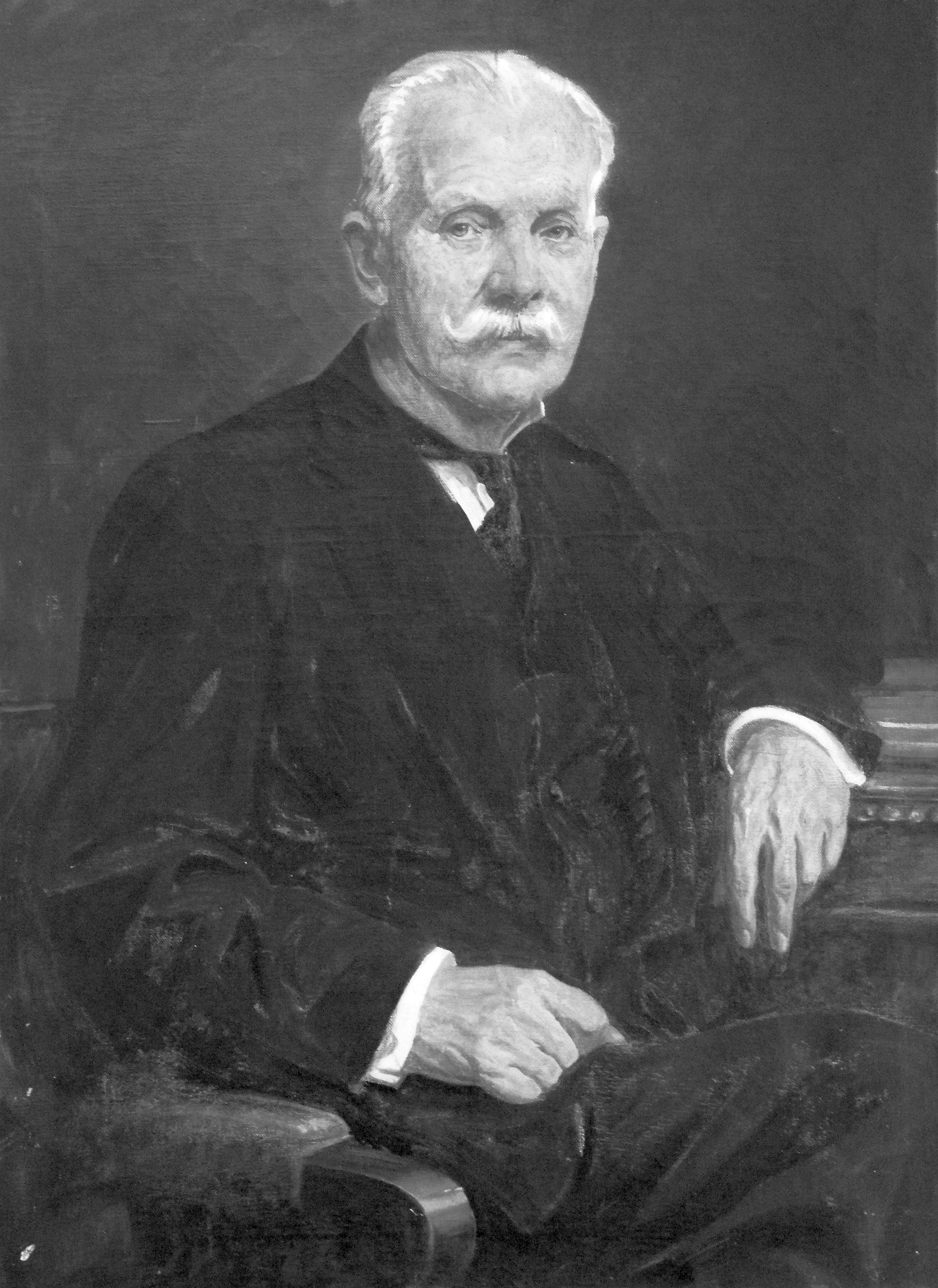 portret Henryka Klawe, malowany przez Stefana Norblina